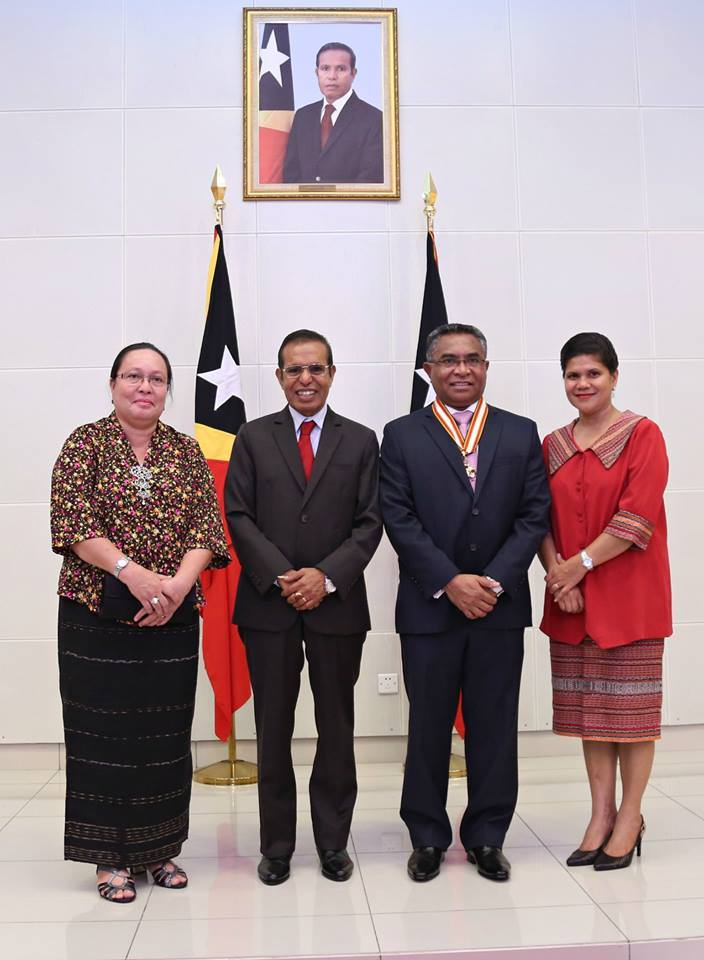 Verleihung des Ordem de Timor-Leste. Taur Matan Ruak, Rui Maria de Araújo und ihre Ehefrauen